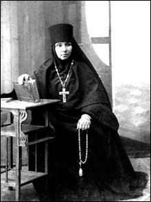 Первая игуменья Старо-Костычевского монастыря Симбирской губернии Маргарита